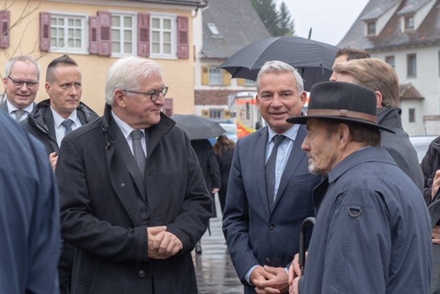 Bundespräsident Frank-Walter Steinmeier und Thomas Strobl, Stellvertretender Ministerpräsident von Baden-Württemberg, am 4. Dezember 2019 bei einem Besuch der Georg Elser Gedenkstätte Königsbronn